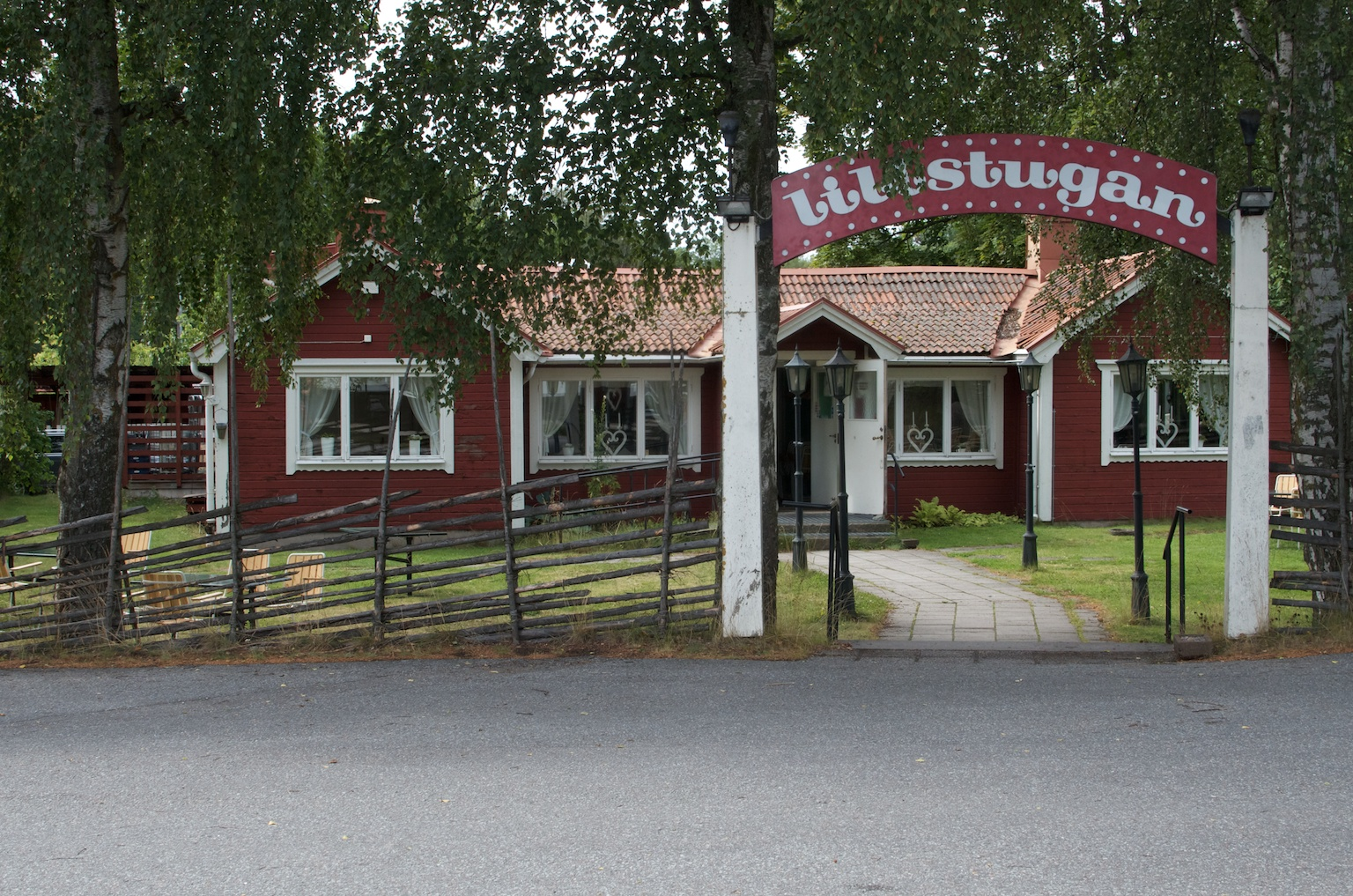 Restaurang Lilltugan